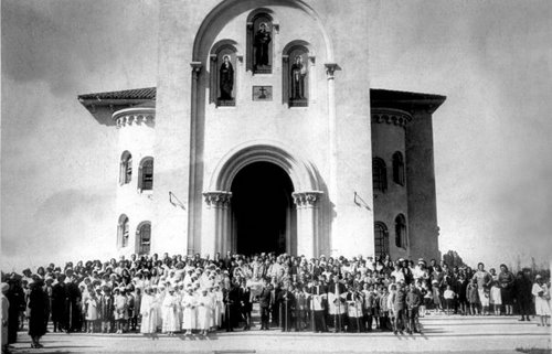 Iglesia de San Antonio de Padua, 1941, Merlo, Provincia de Buenos Aires.